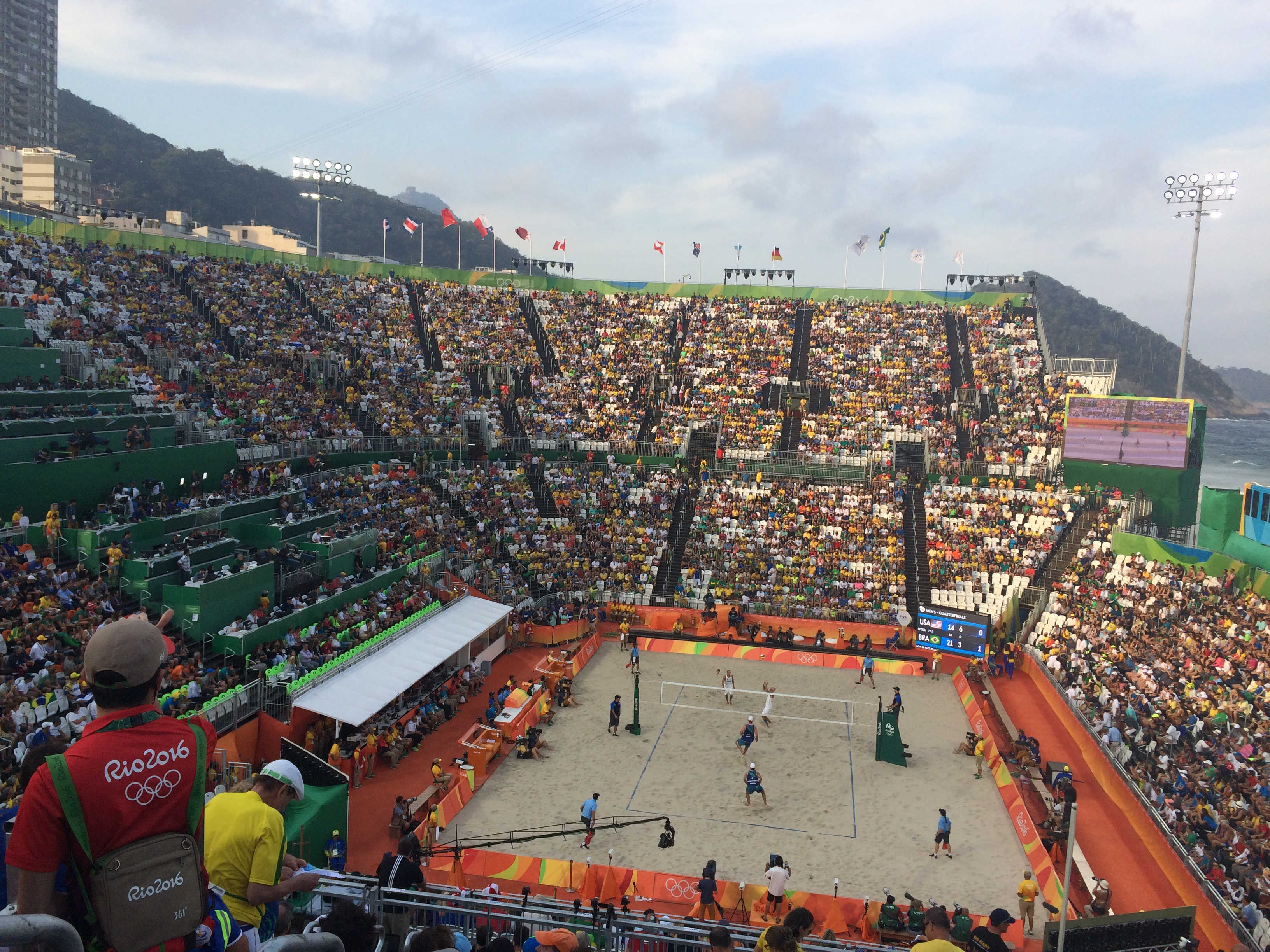 Visão do interior da Arena de Vôlei de Praia de Copacabana - Rio 2016